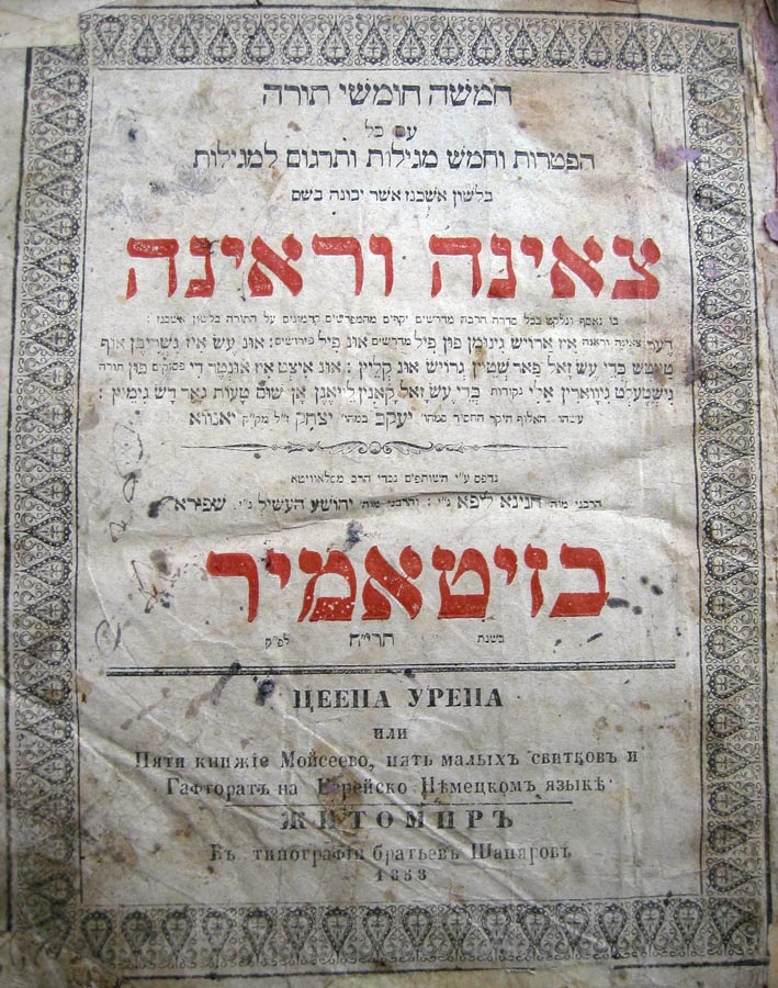 Обложка издания Цэна у-рэна 1853 года